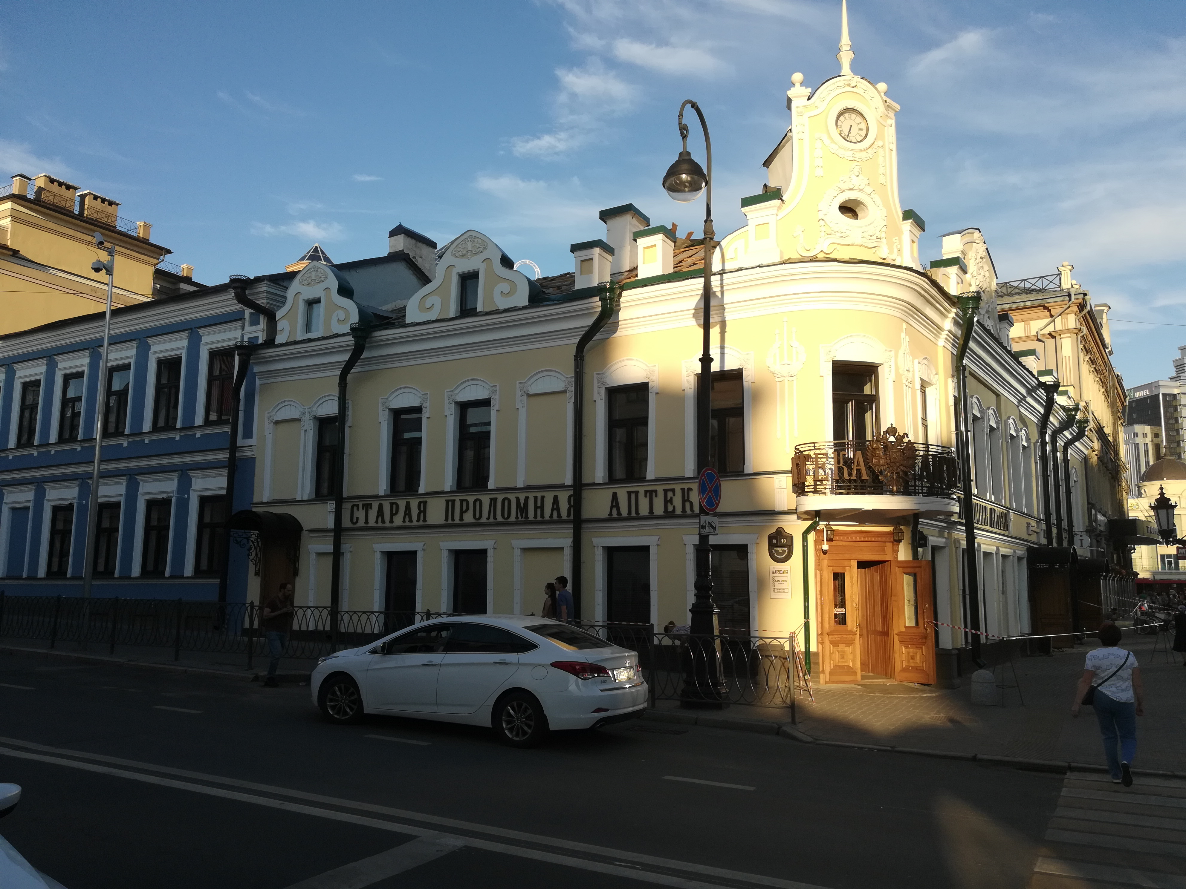 Аптека